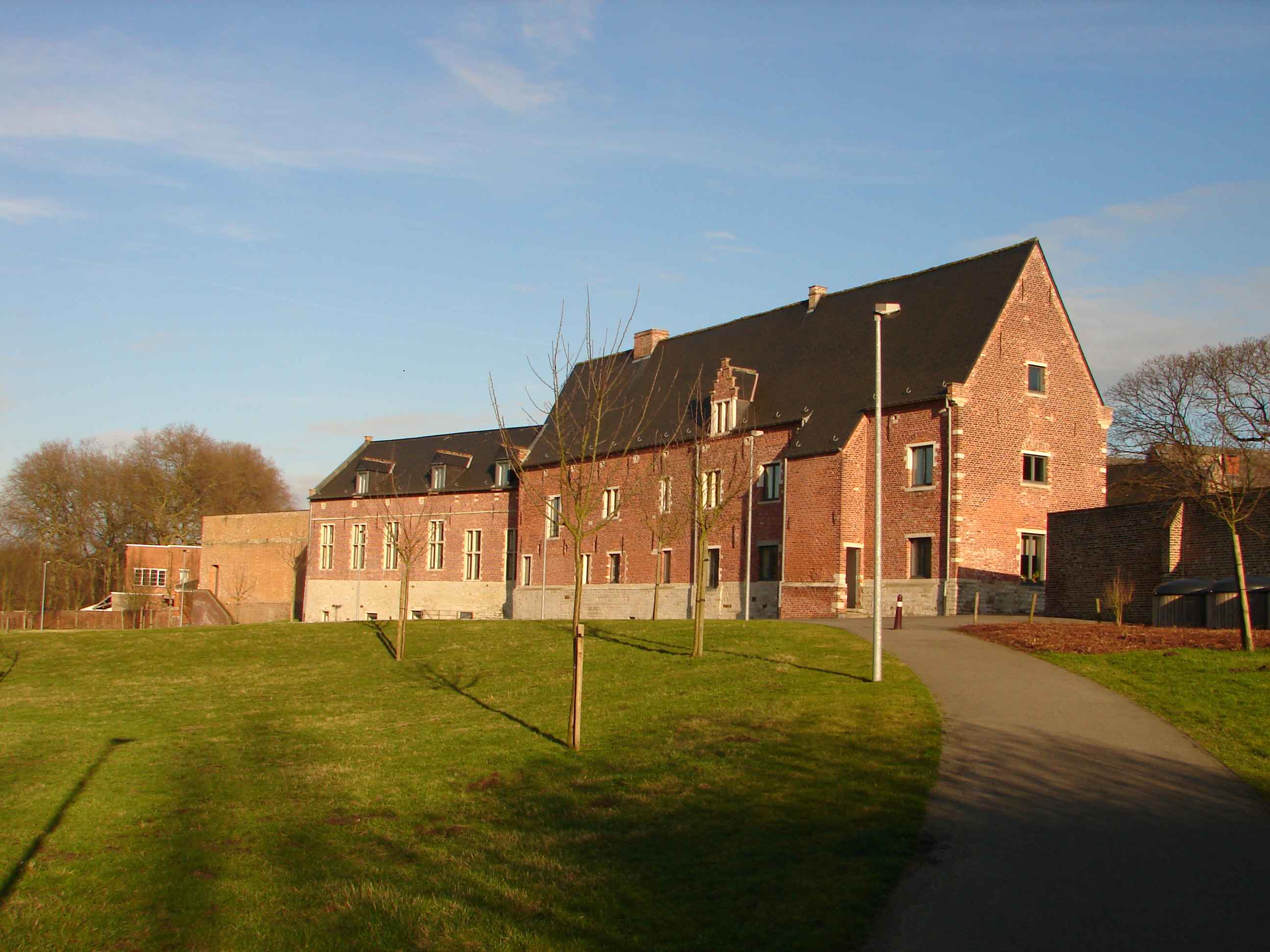 Celestijnenklooster Nu universiteitsbibliotheek, Heverlee